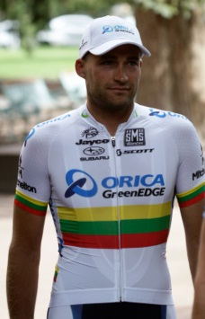 Tomas Vaitkus en el Tour de Utah 2013